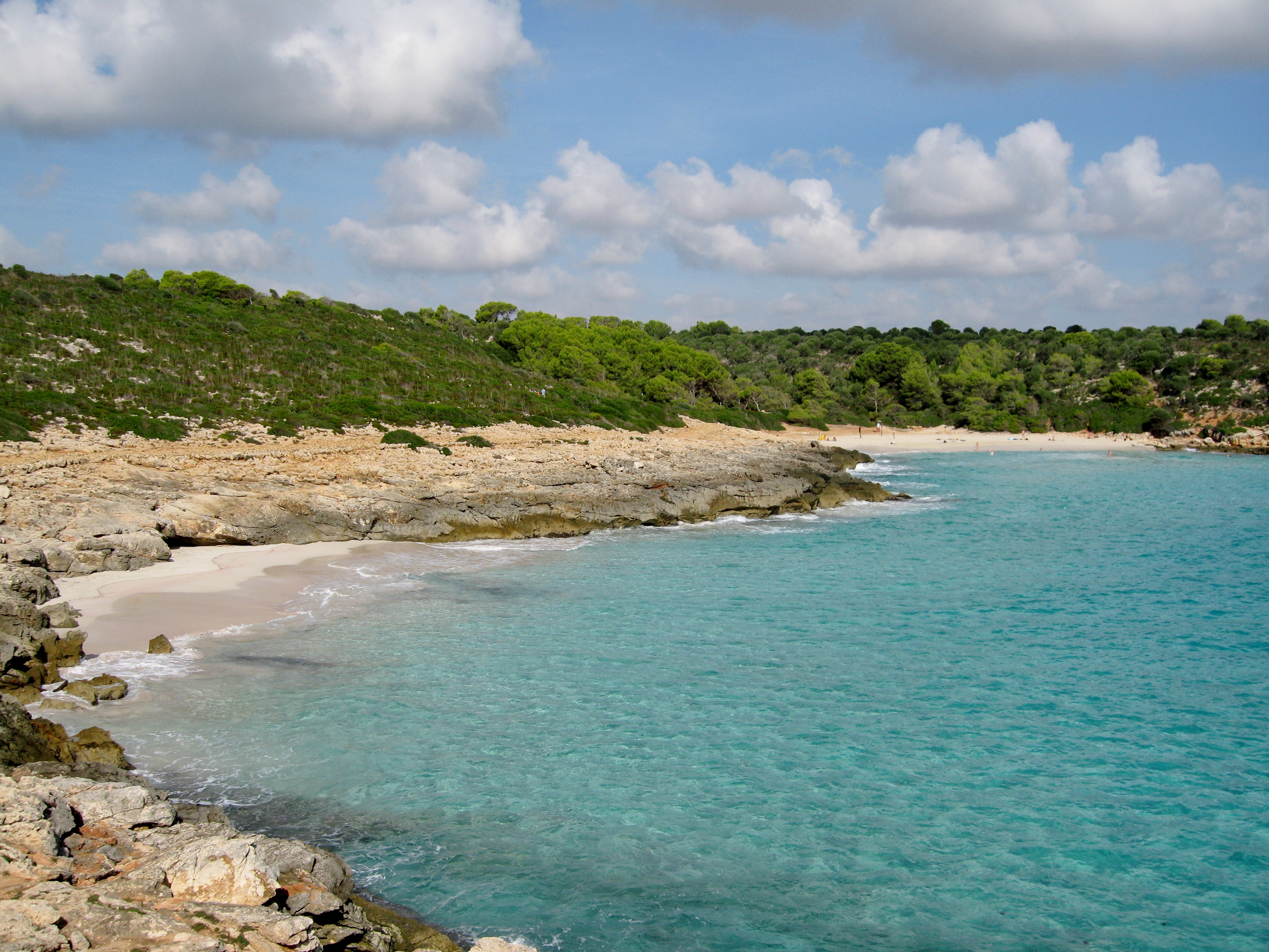 Cala Varques, Manacor, Mallorca, Spain